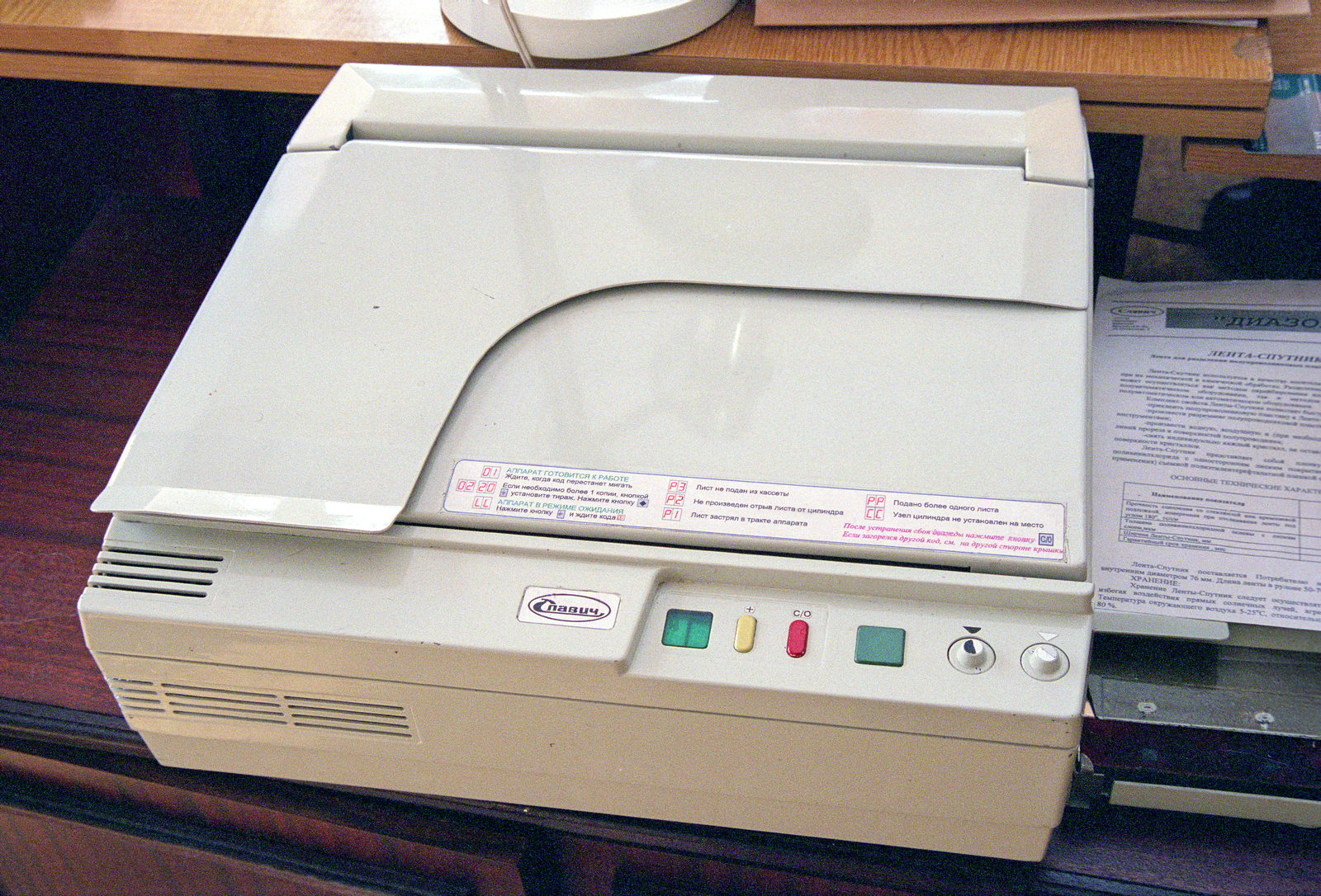 Копировальный аппарат, разработанный в НИИ электрографии (город Вильнюс) по заказу МО СССР. Главный конструктор Олег Родионович Харин. Металлический аппарат рассчитан на работу в полевых условиях, прост и надёжен, выдерживает падение с высоты метра. В 1998 году в ОАО «Компания Славич» хотели начать производство этого аппарата, тонеров и фоторецепторов к нему, однако не нашли заказчика.